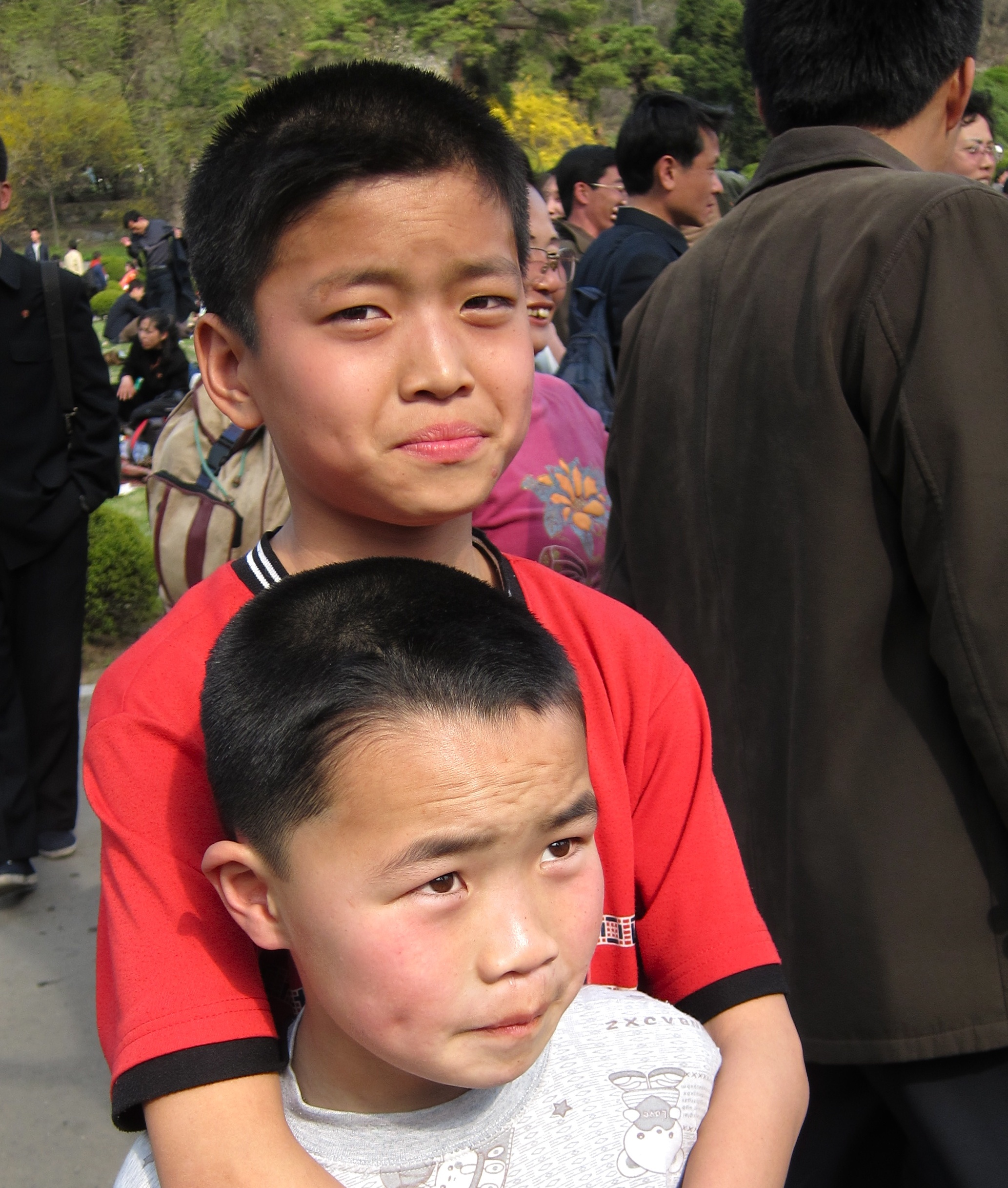 May Day Celebration in Moran Hill Park; Pyongyang, DPRK (North Korea)